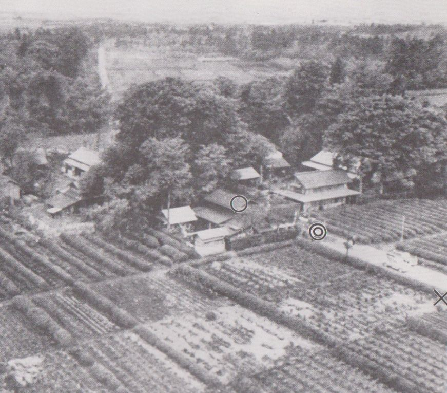 東の上空から佐野屋を望む。○が佐野屋、◎が被害者の姉の位置、×が犯人の位置。